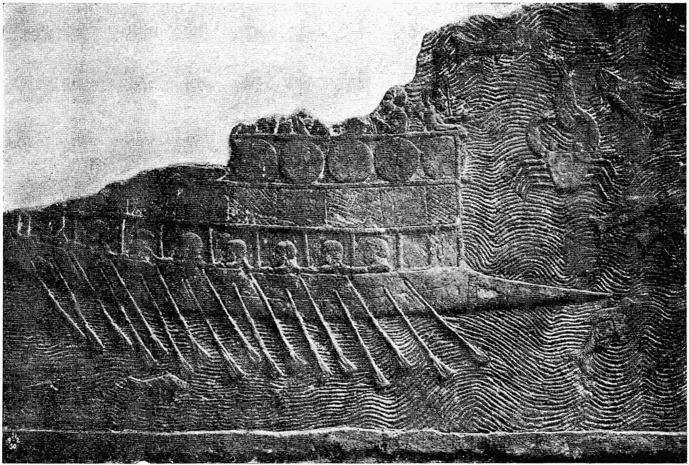 galère du type phénicien